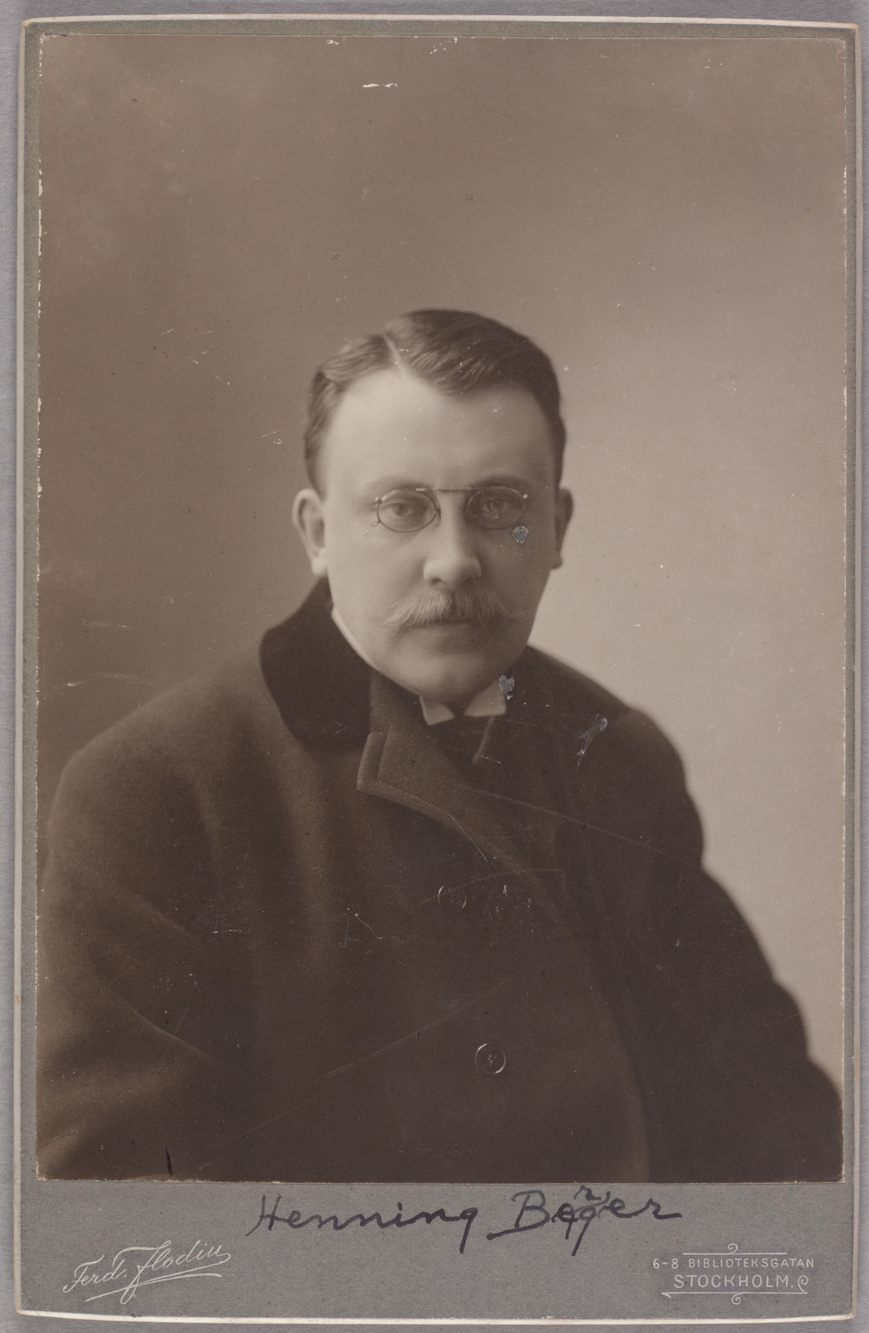 Henning Berger (1872-1924)